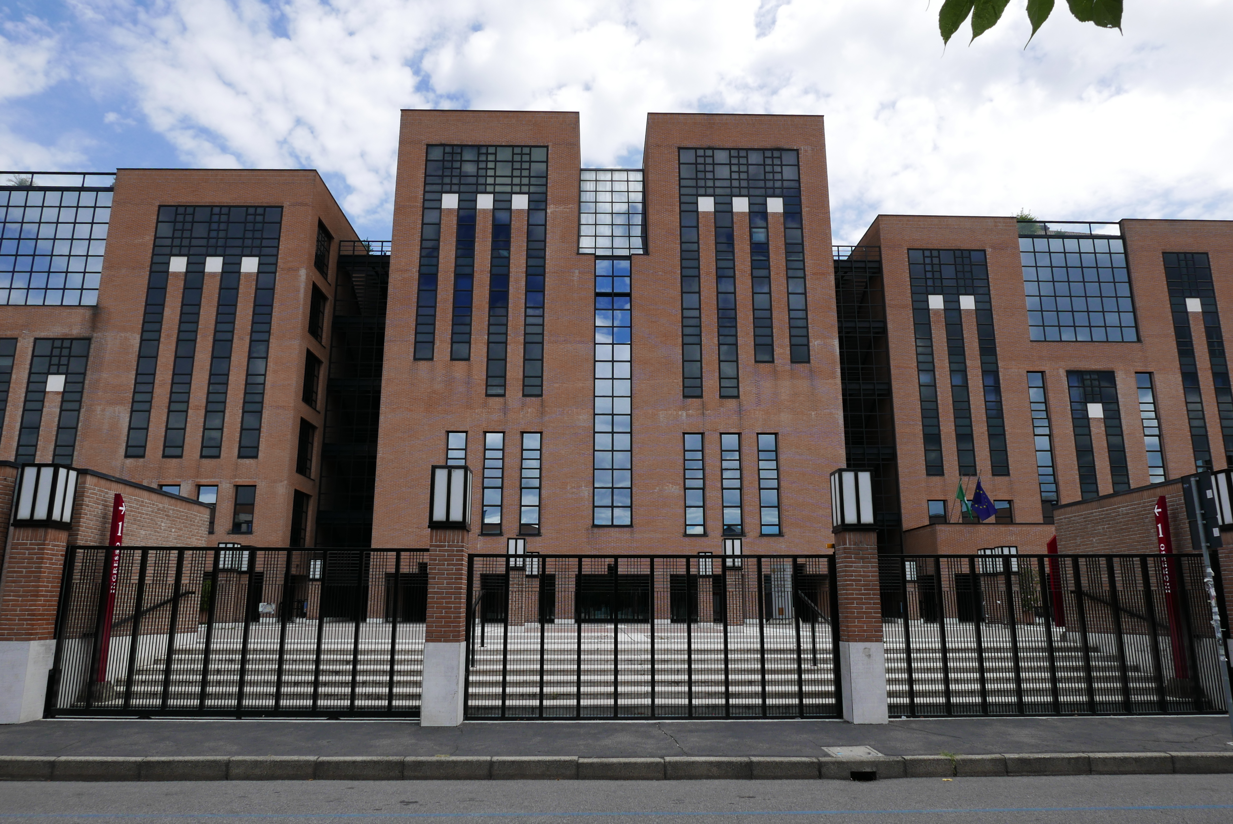 Sede di Milano